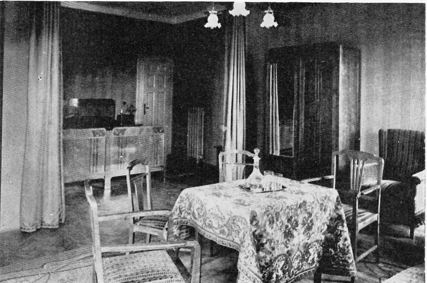 Hotelová izba - Grand Starý Smokovec